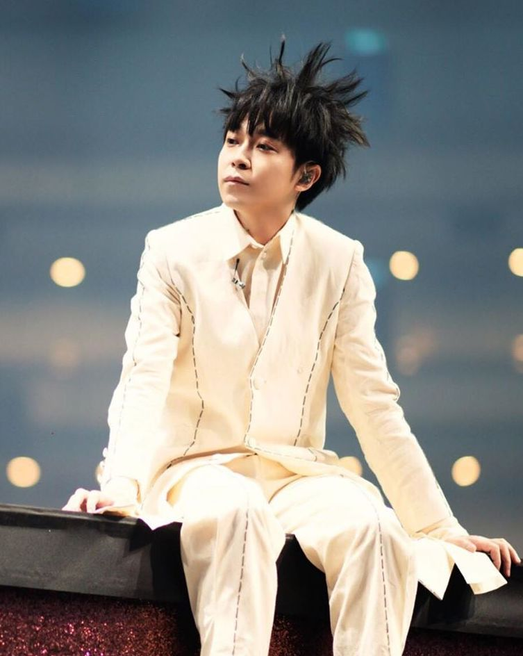 中文（台灣）: 吳青峰於2019年11月23日舉辦《太空備忘記》巡迴演唱會